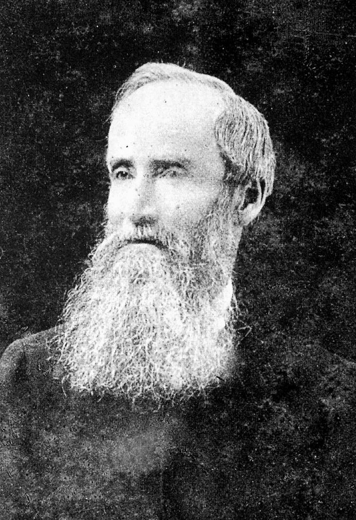 Le réverend Wentworth Webster vers 1900